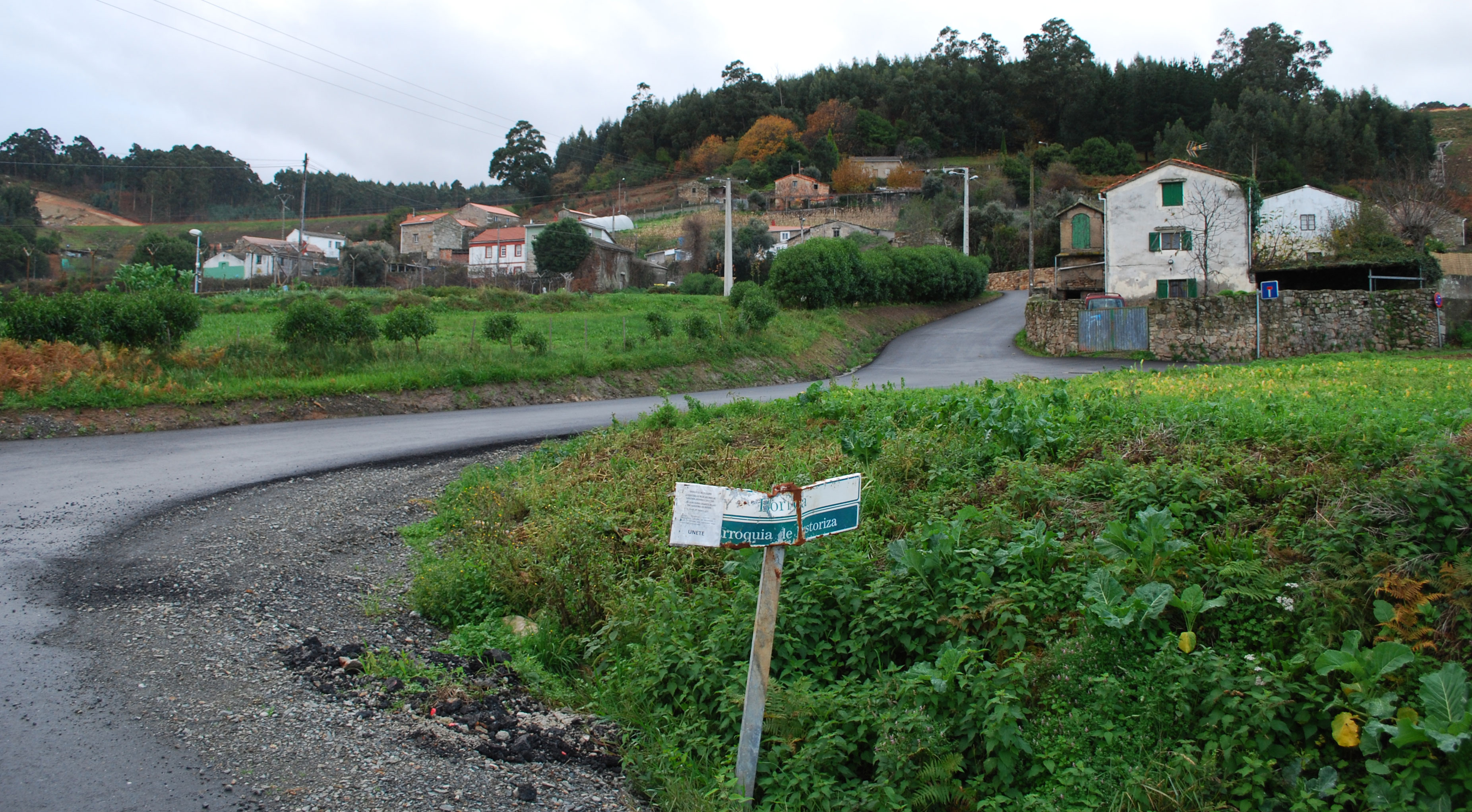 Vista da poboación de Borroa A Pastoriza Concello de Arteixo A Coruña Galiza Spain